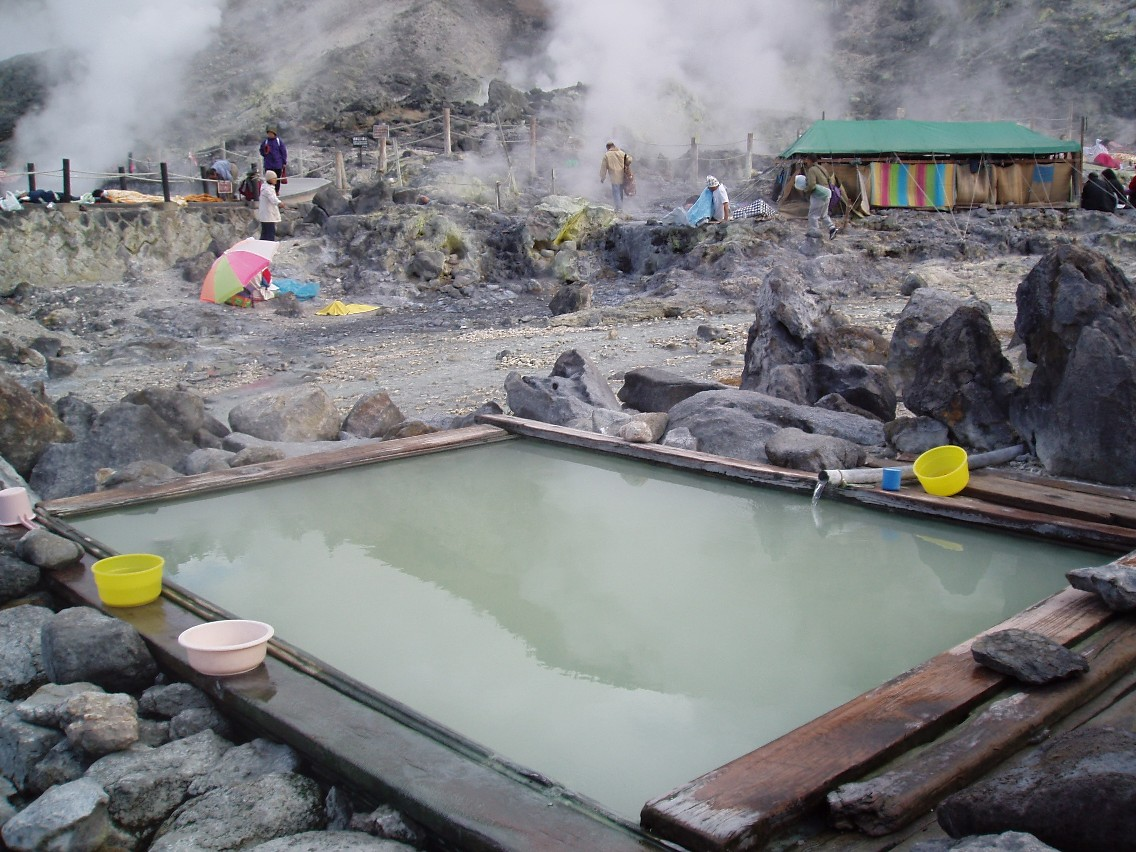 秋田県玉川温泉、岩盤浴場と無料露天風呂。